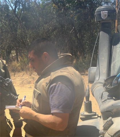 צולם במצלמה אישית שלי (אבירם זינו) במהלך מבצע צוק איתן